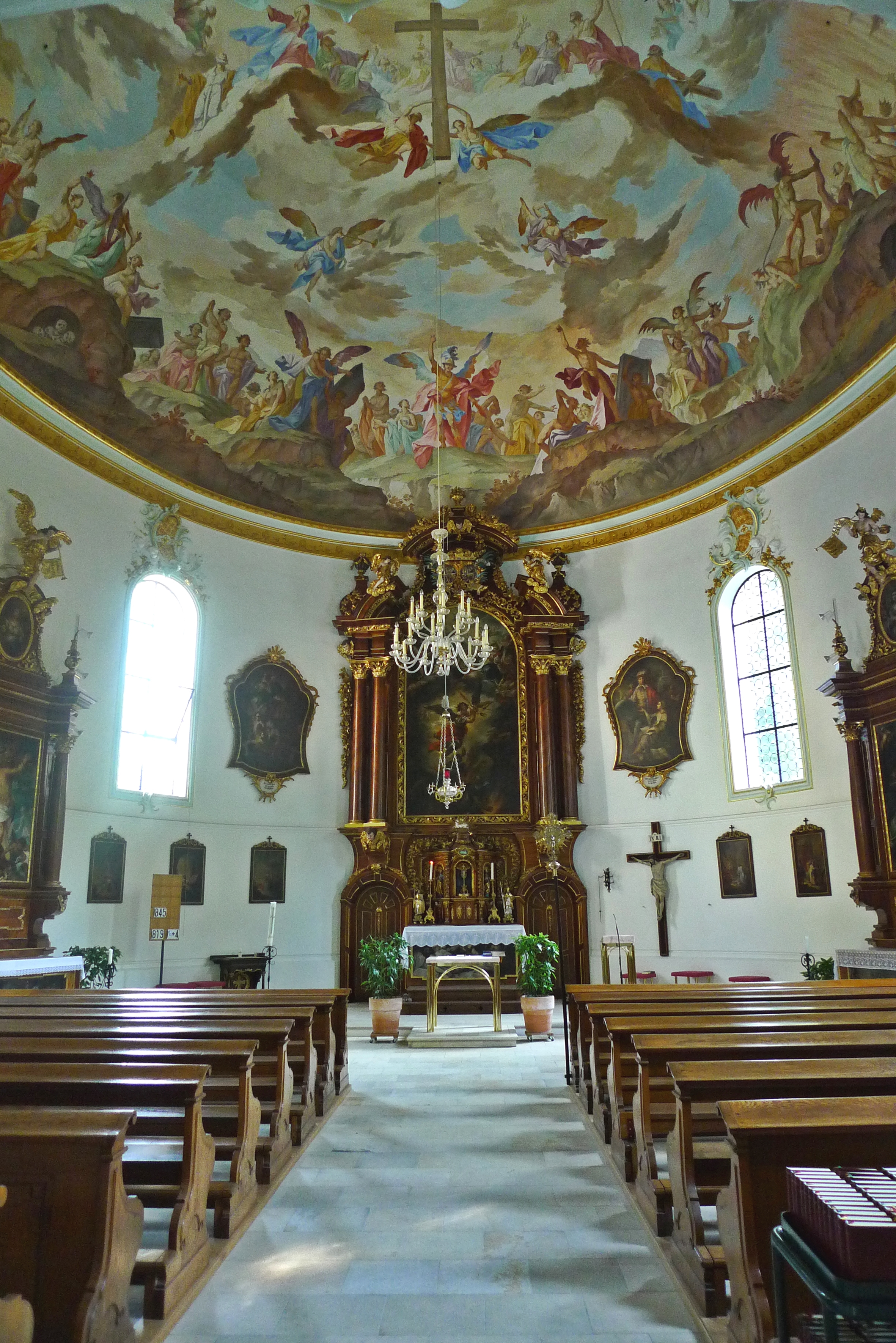 Katholische Friedhofskapelle St. Michael in Augsburg. 1772 Bemalung der Flachkuppel durch J.J.Anton Hubers Hauptwerk. Fresko des Jüngsten Gerichtes. Der in Öl gefertigte Entwurf wird von der Friedhofsverwaltung aufbewahrt. Die Bedeutung der Kirche liegt in der Hauptsache in den vorhandenen Bildwerken, zum Beispiel Johannes Bernhard Fischer von Erlach. Der aus Nußbaum geschnitze Hochaltar wurde von den Fuggern gestiftet.